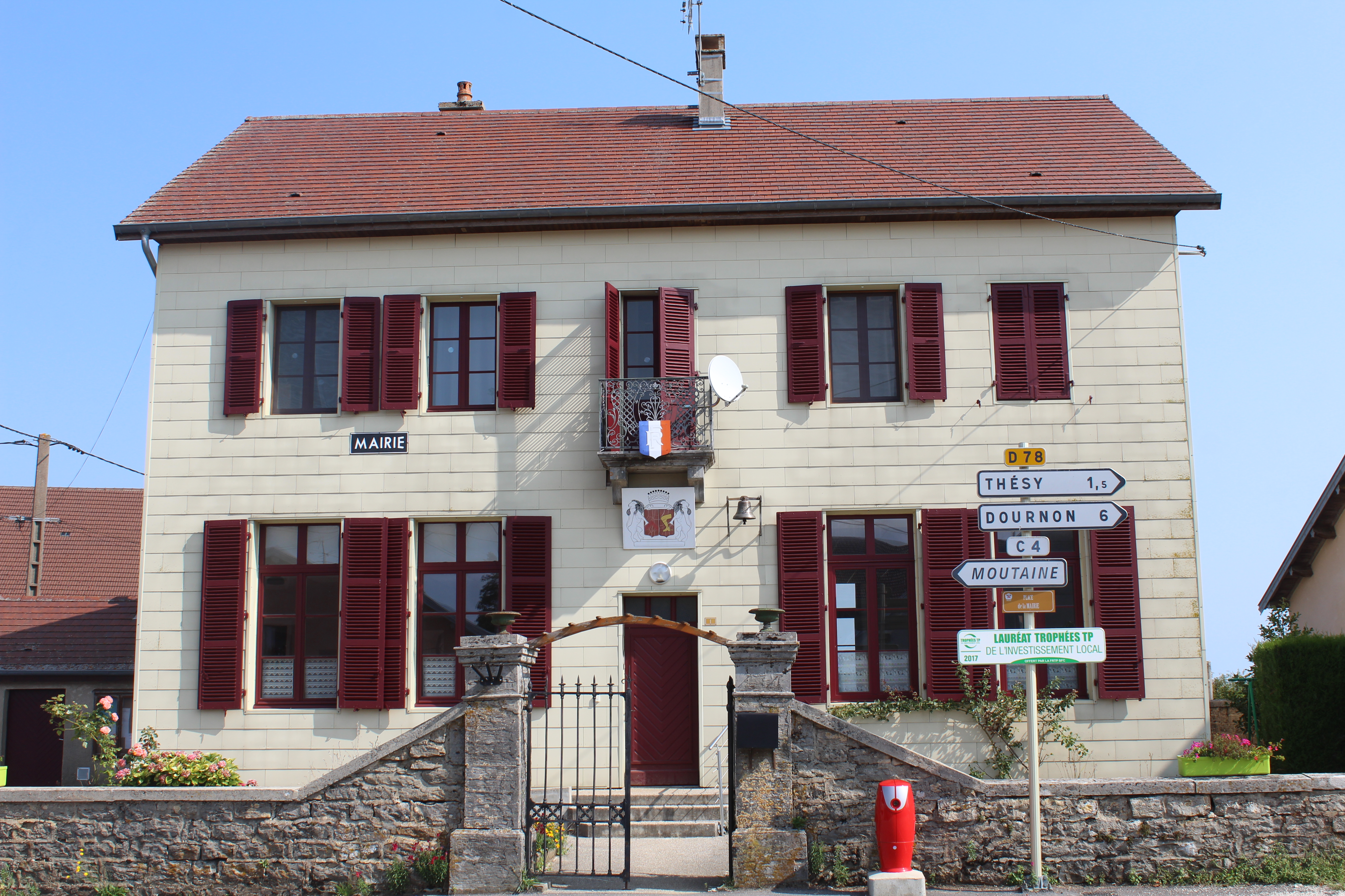 Mairie d'Aresches.